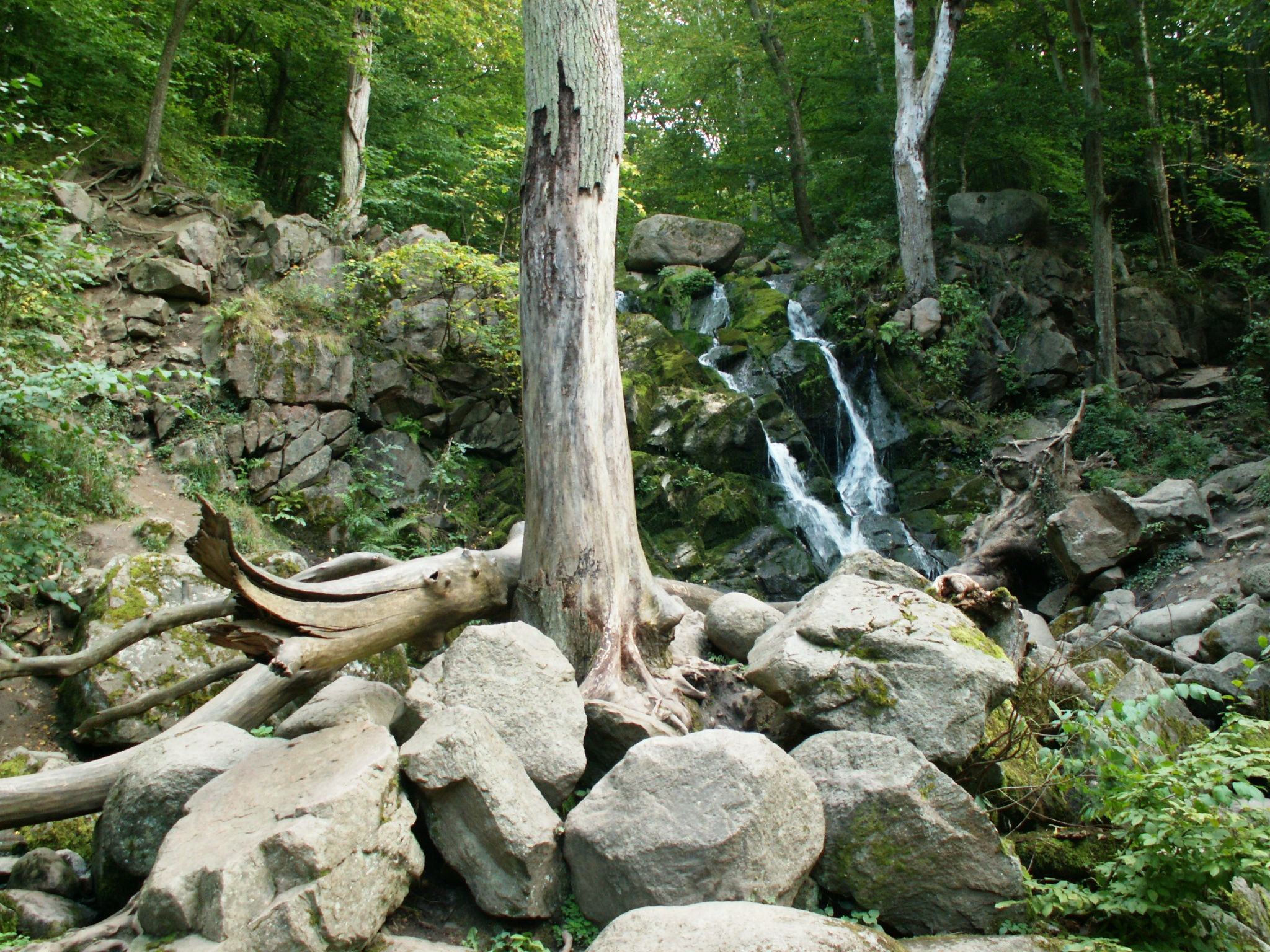 wodospad Dondalen